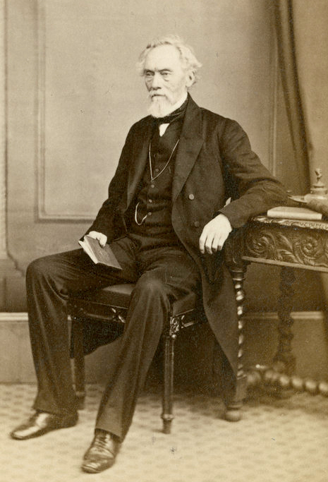 Archibald Billing